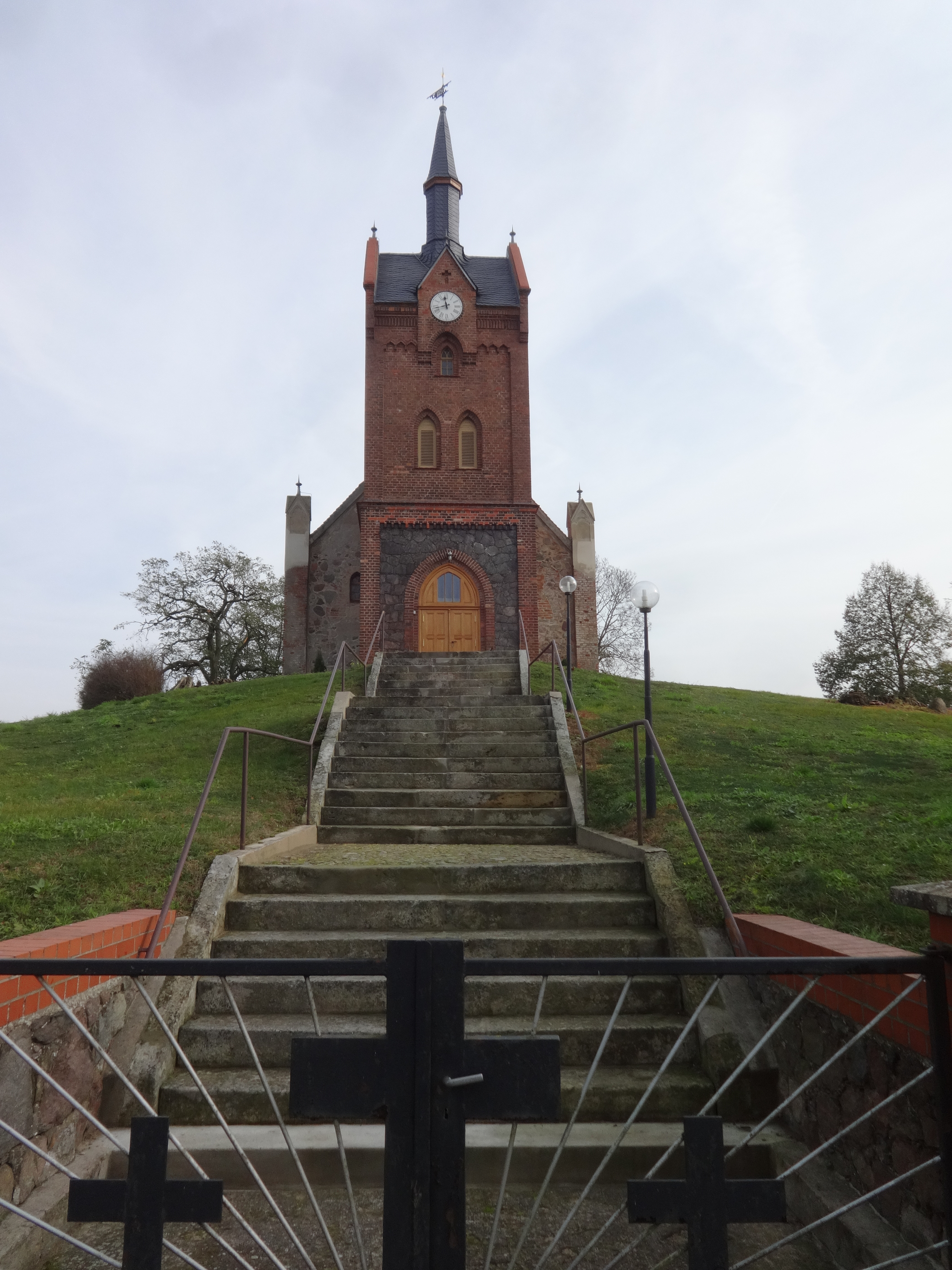 Die Dorfkirche in Wulkow, Gemeinde Neuhardenberg im Landkreis Oder-Spree, ist eine Feldsteinkirche, die 1874 in neugotischen Formen erneuert wurde. Gleichzeitig errichtete die Kirchengemeinde den Westturm.